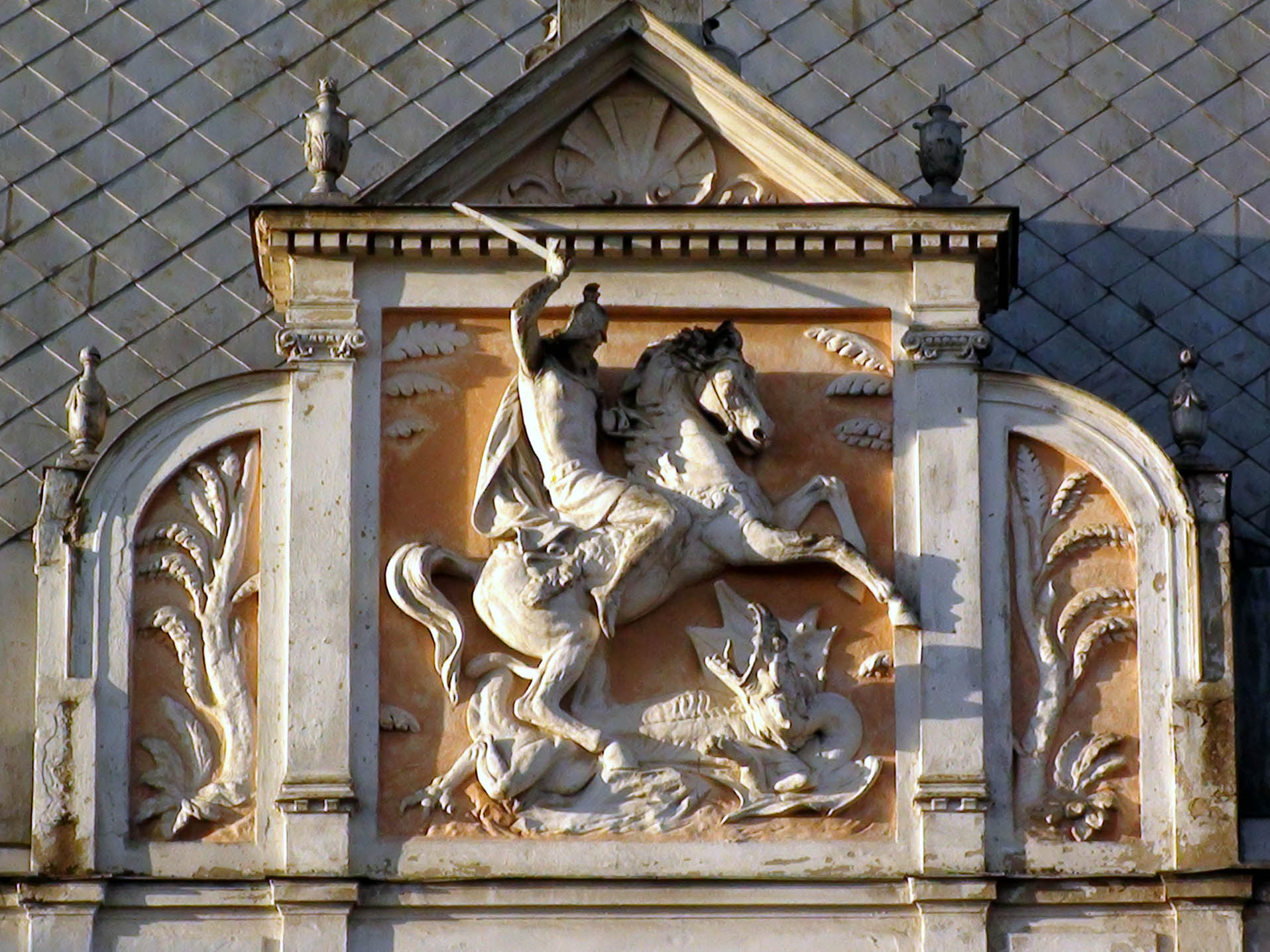 Святий Георгій - рельєф на фронтоні готелю "Жорж" у Львові. Скульптор Леонард Марконі та Антон Попель.